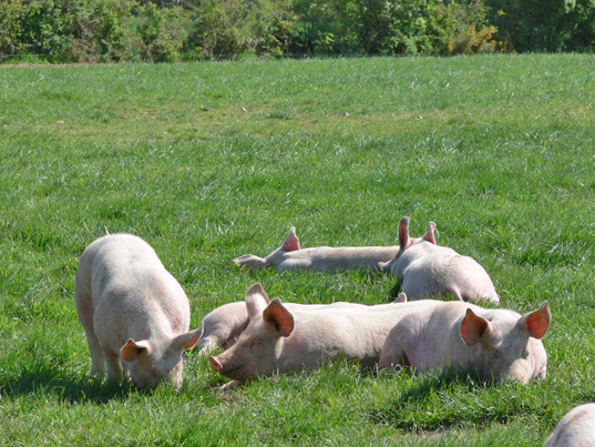 Porc Fermier plein air de Vendée